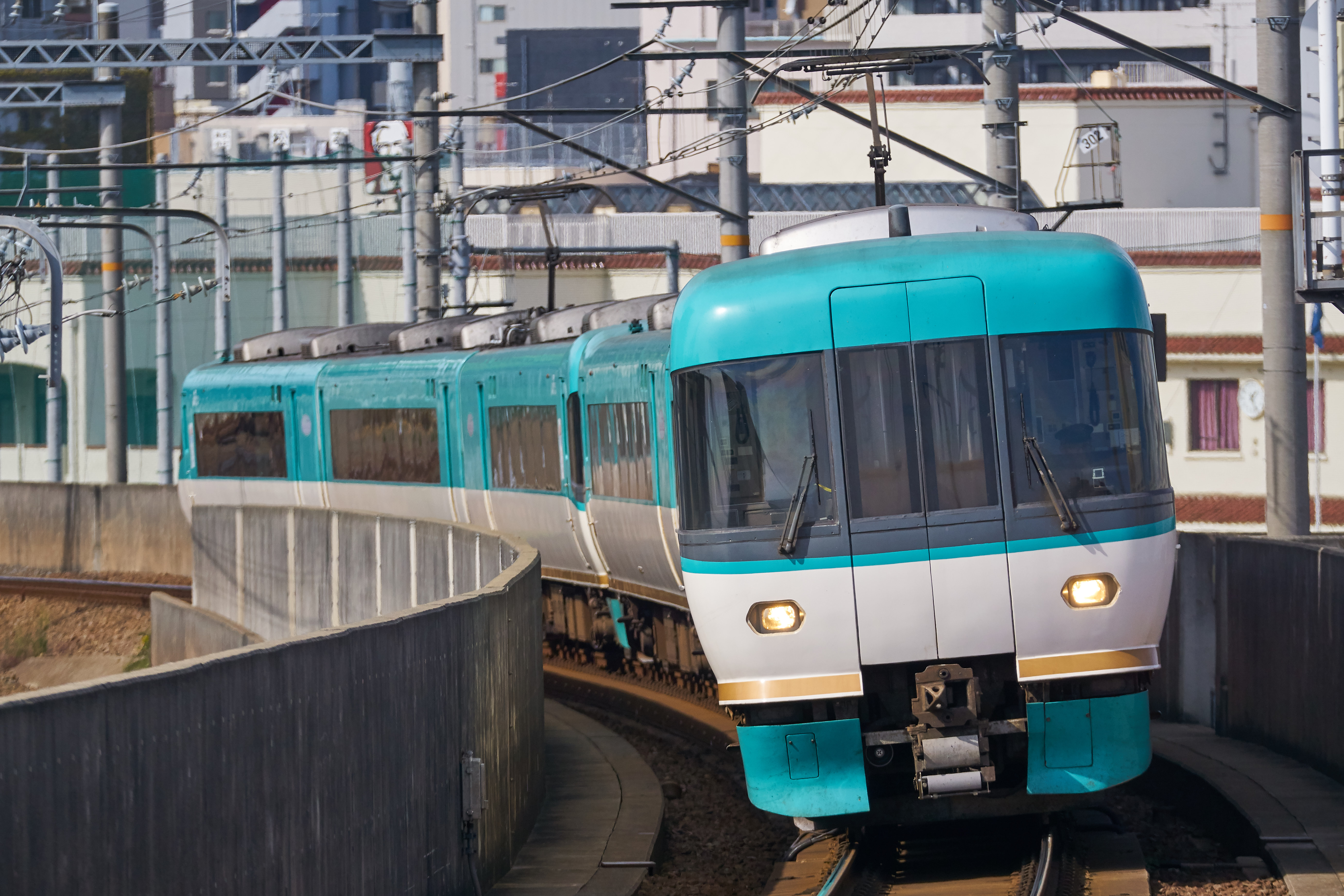 JR West series283